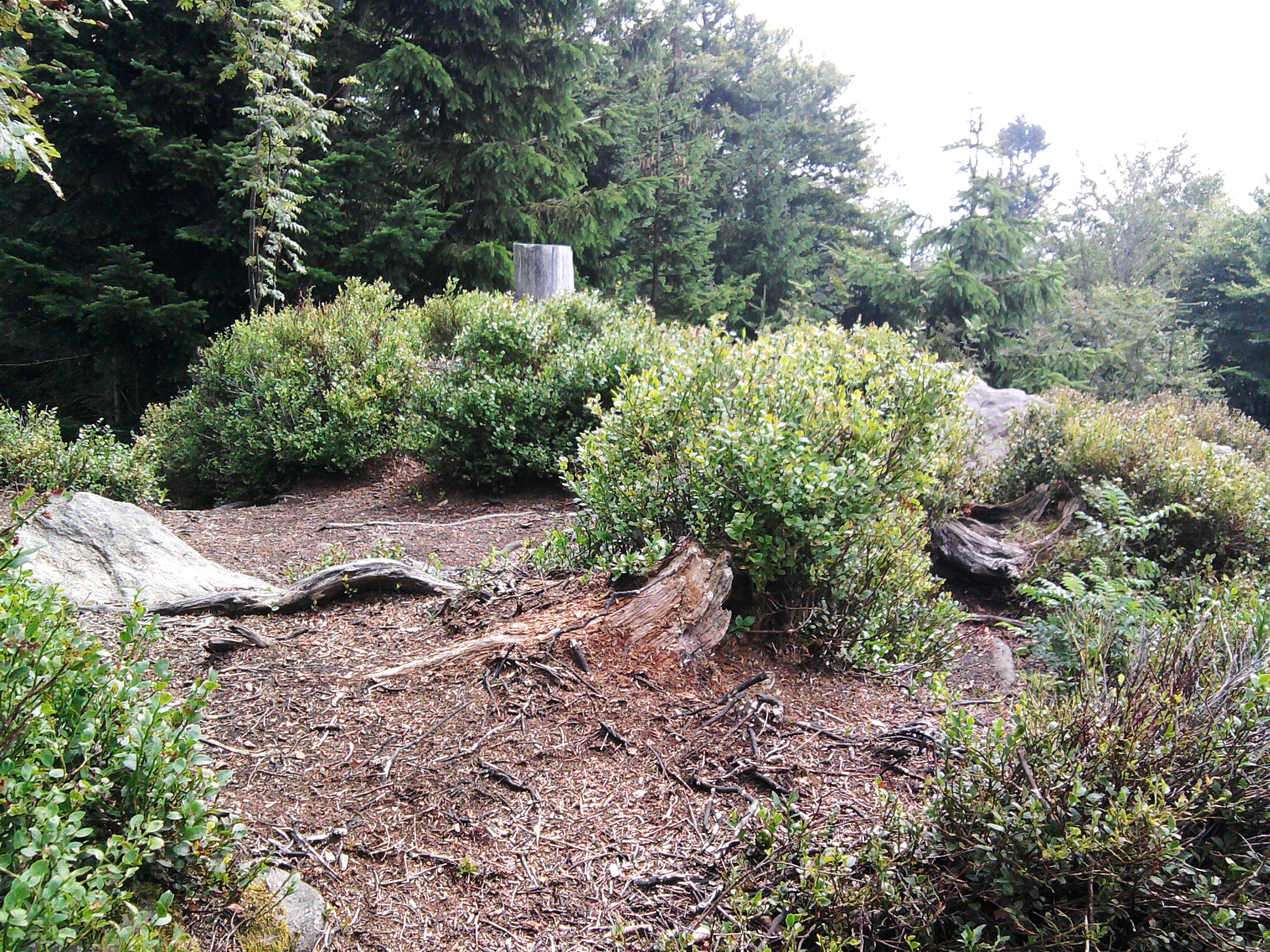 "Gipfelplateau" des Rauhen Kulms (Bayerischer Wald)